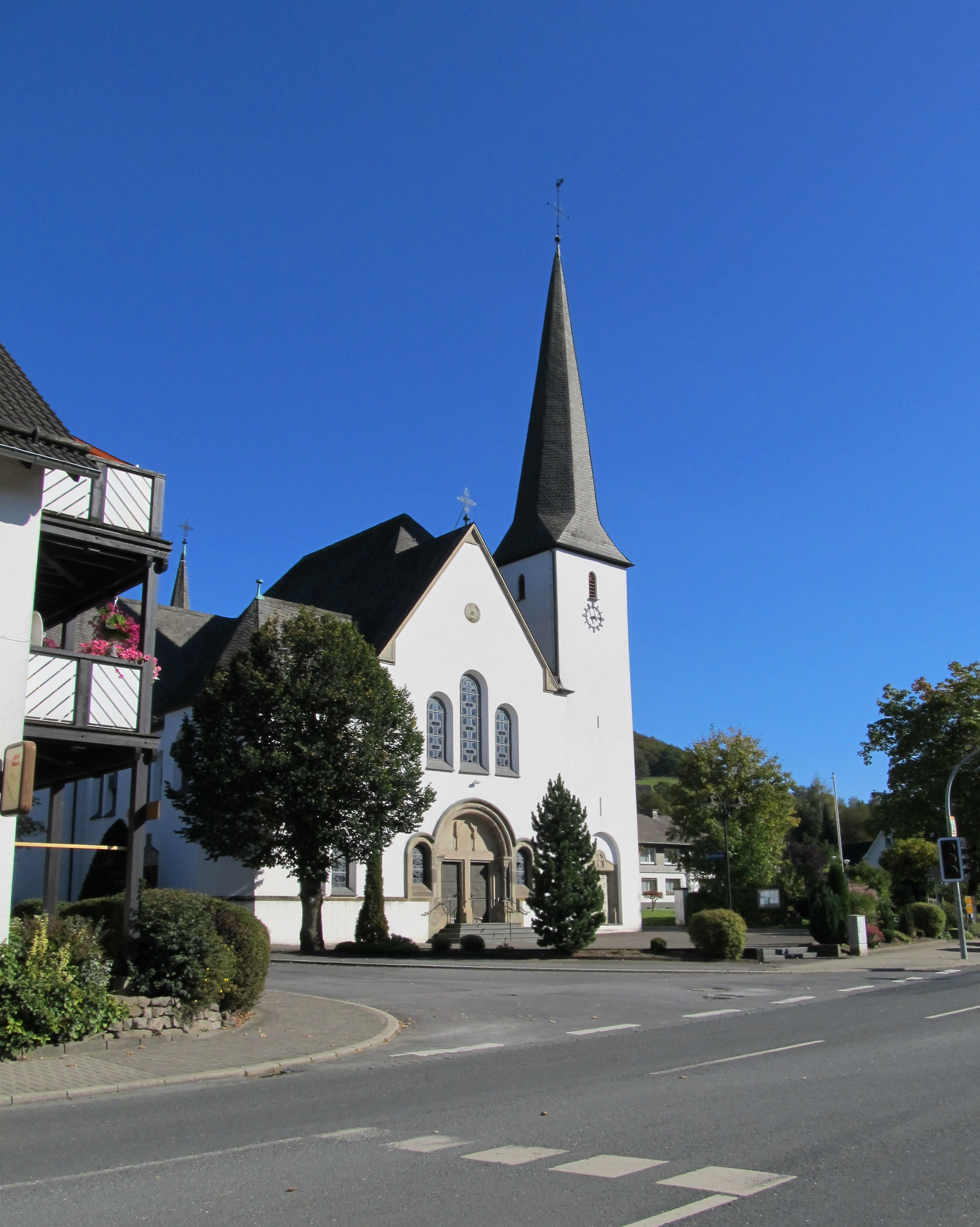 Denkmalgeschützte Kirche St. Hubertus in Schmallenberg-Dorlar (Germany)